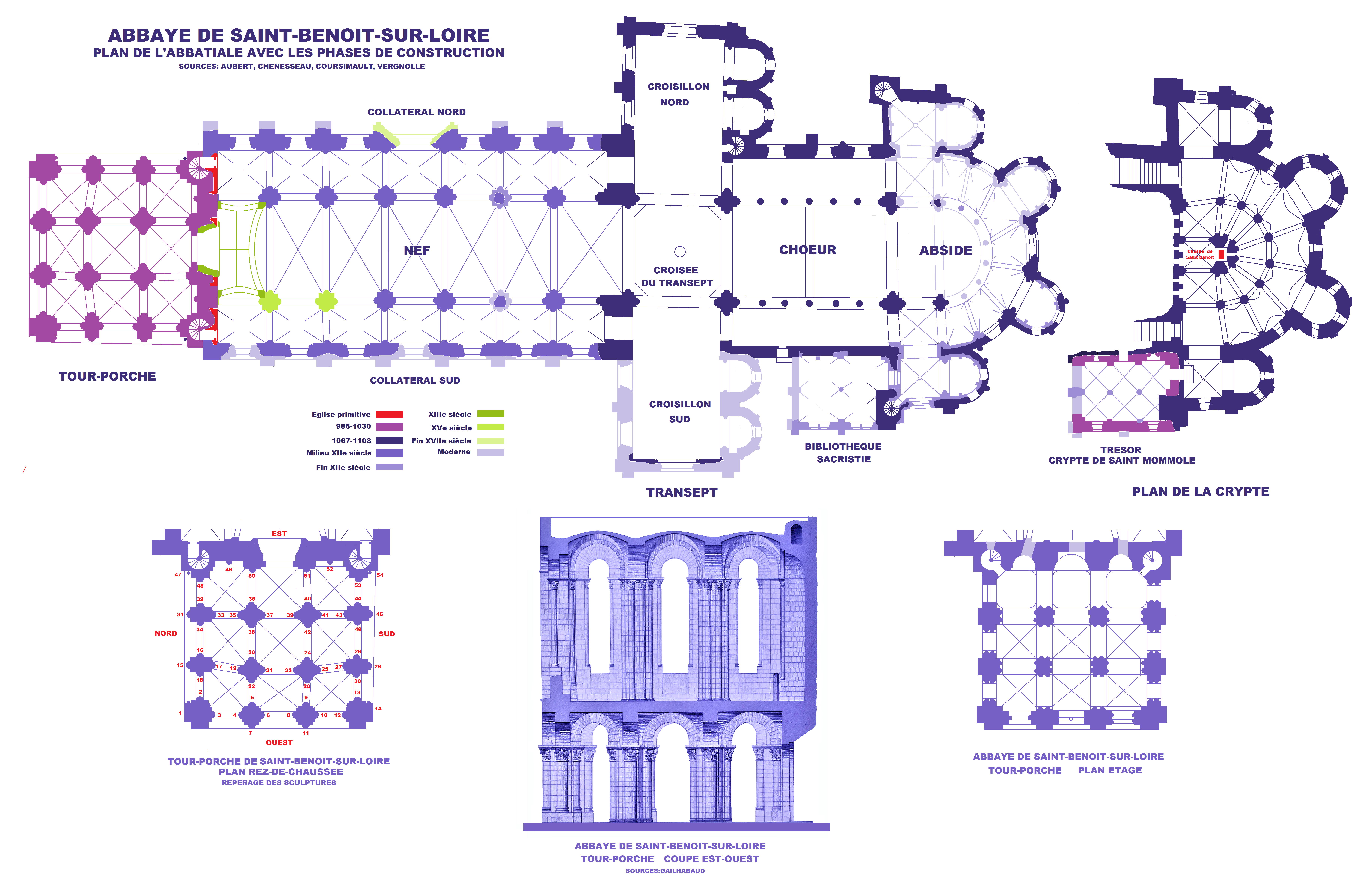 Abbaye de Fleury, plans et coupe